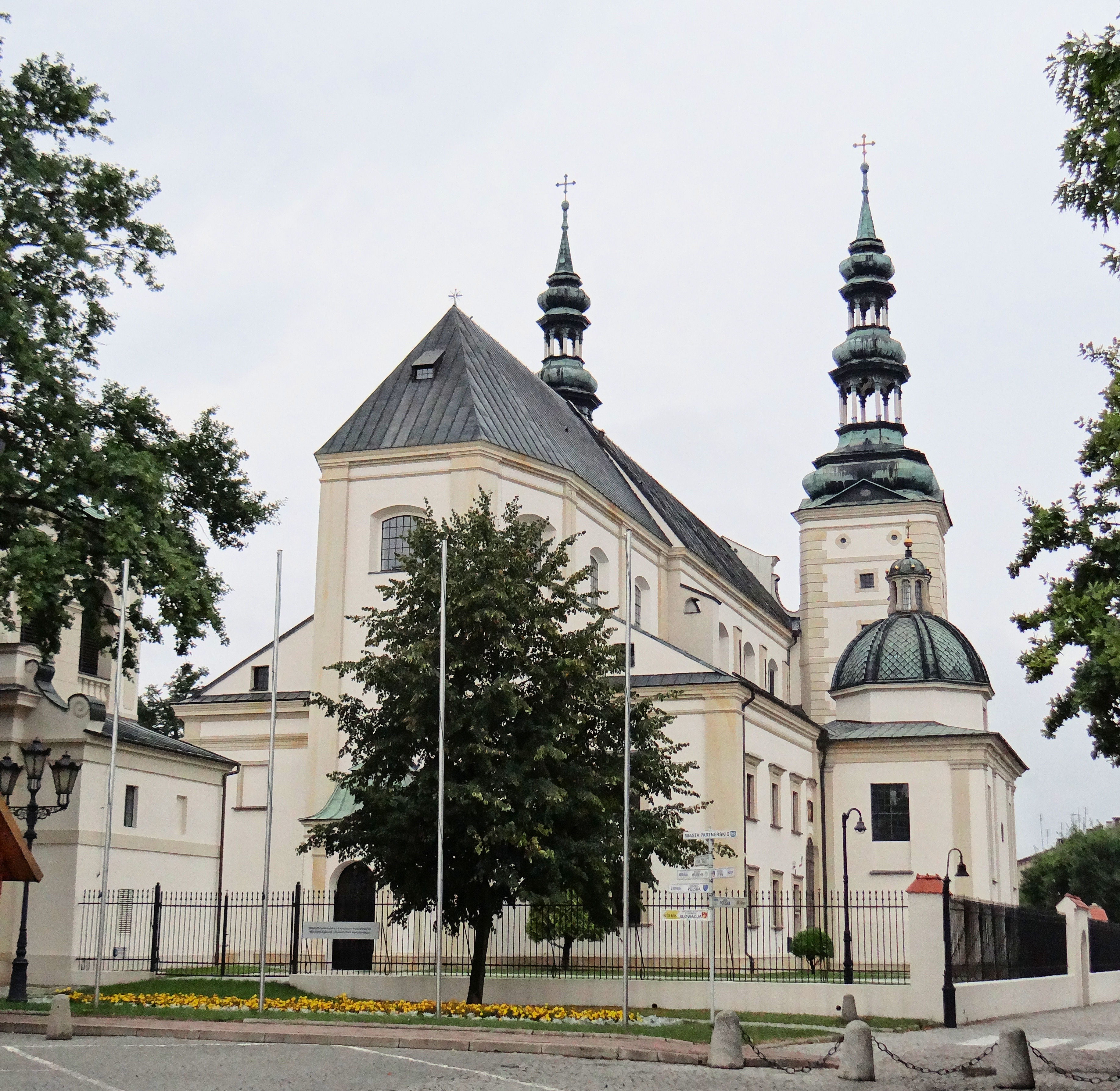 Bazylika Katedralna w Łowiczu - widok od strony północno-wschodniej